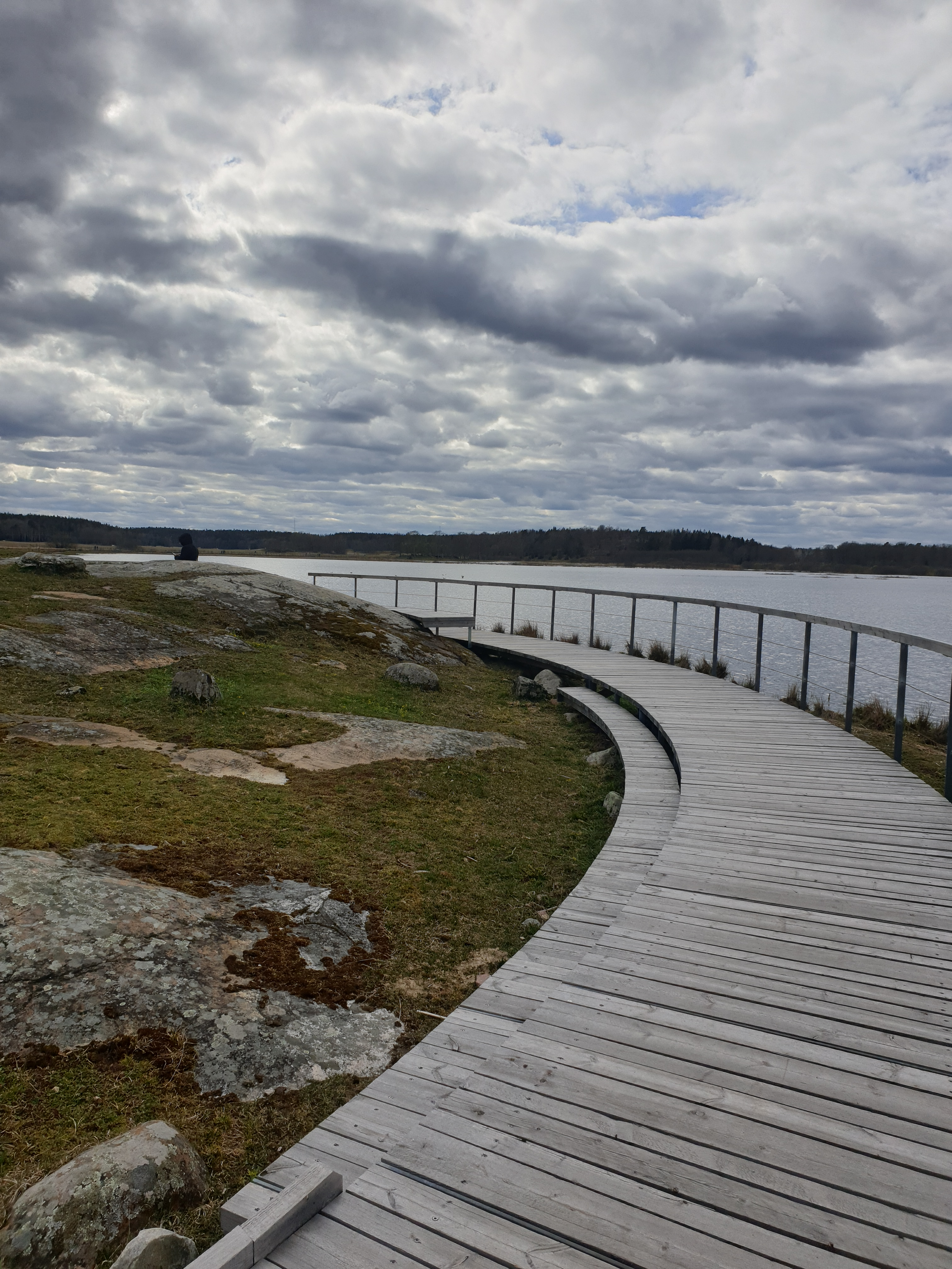 Angarnsjöängen har rullstols anpassning